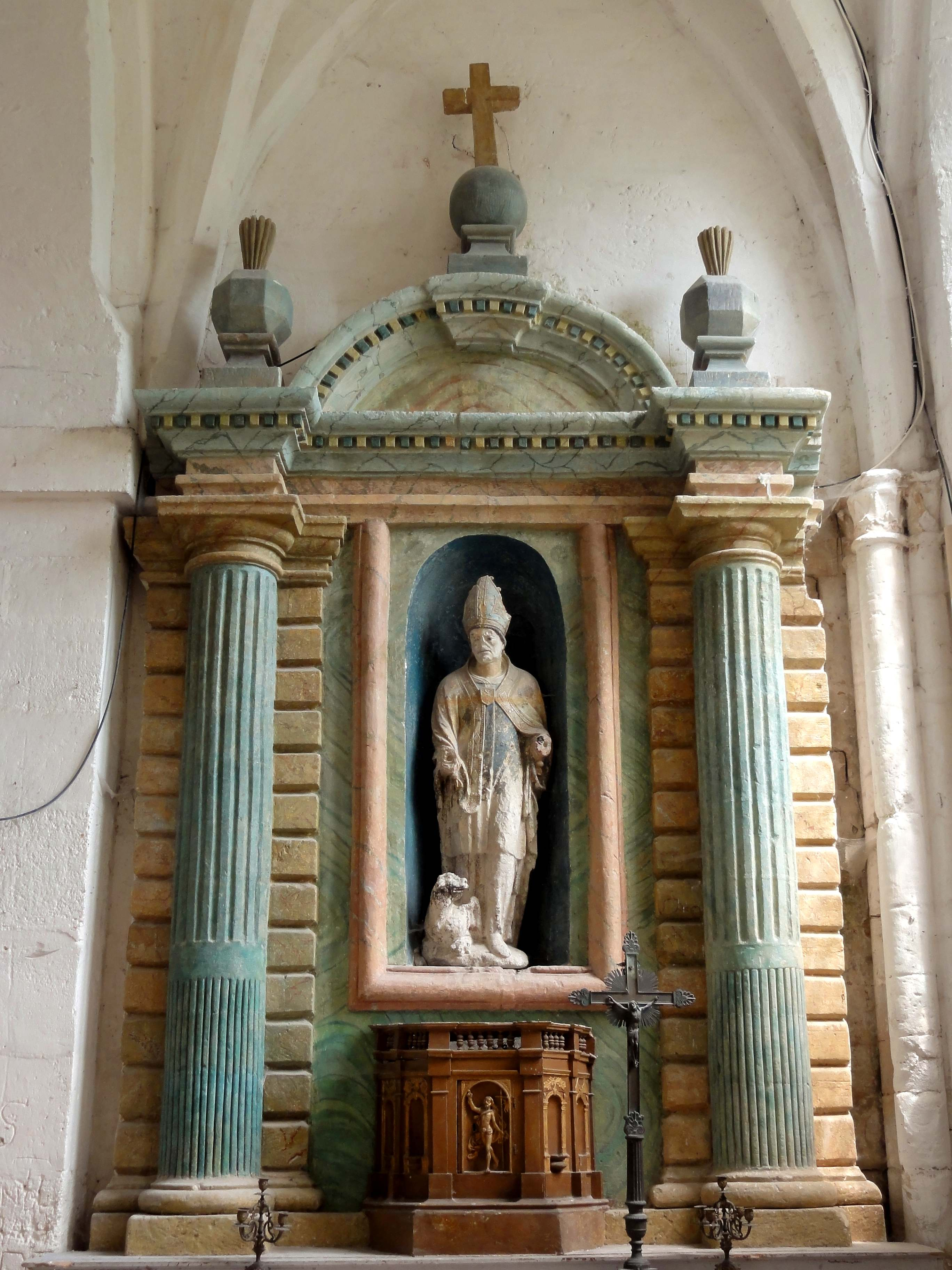 Mobilier de l'église (voir titre).